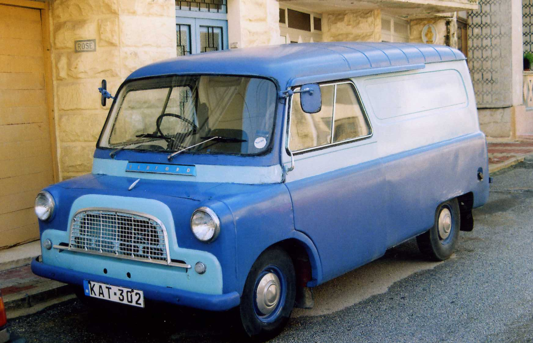 Bedford CA Van,Ghajnselim Gozo Feb 2009